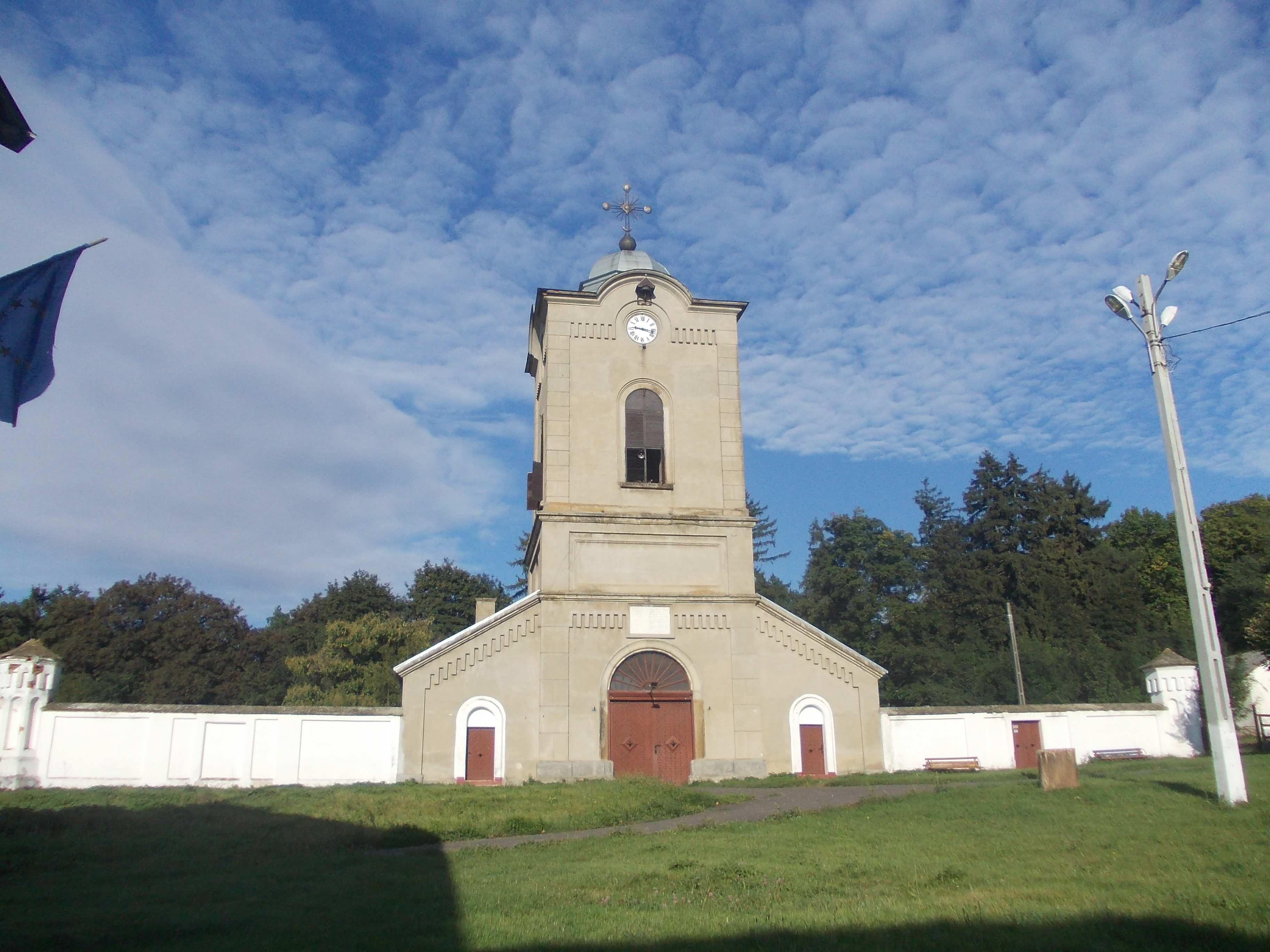 Turn clopotniță, Văleni, Neamţ 02